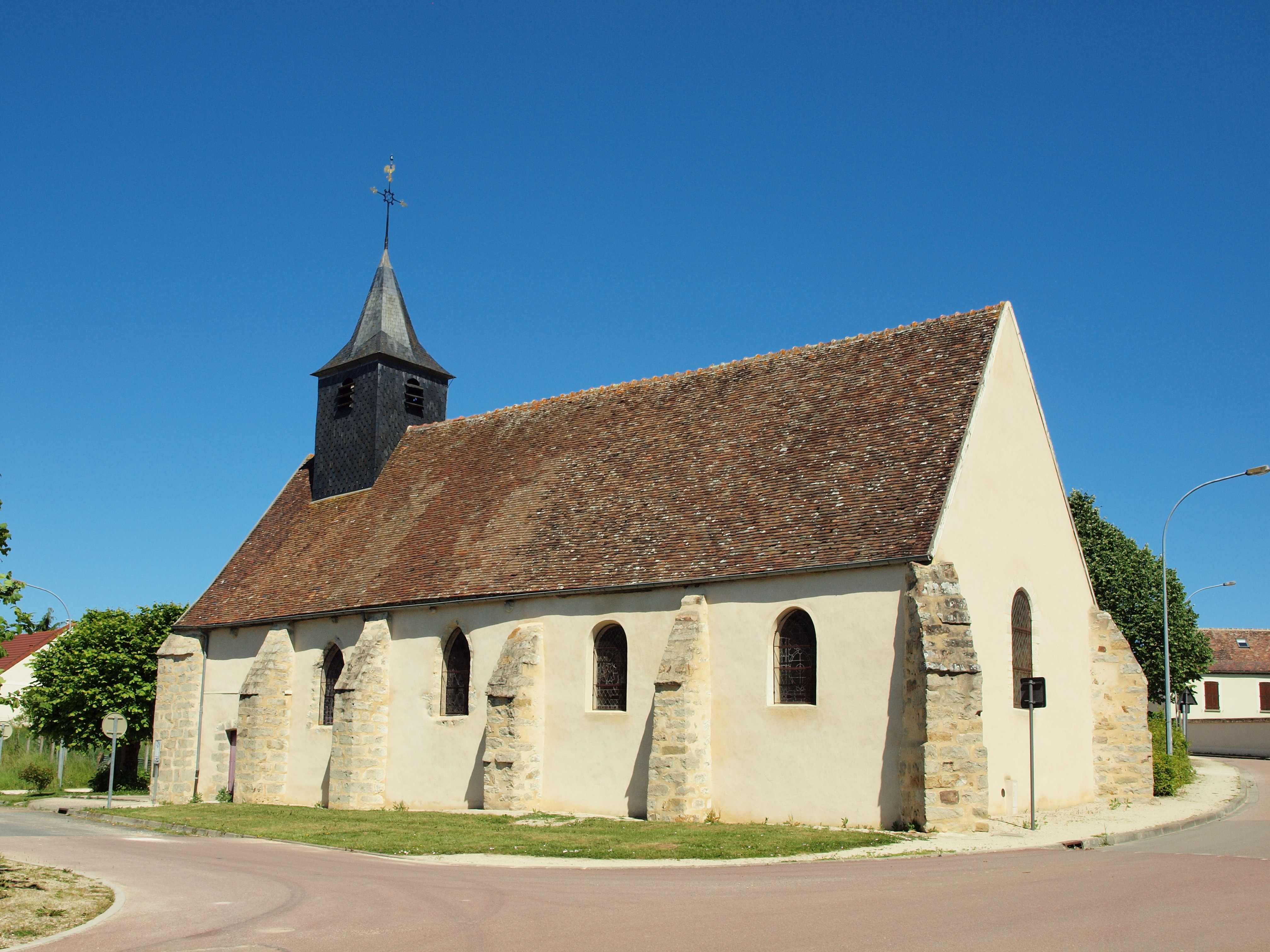 Villeroy (Yonne, France)